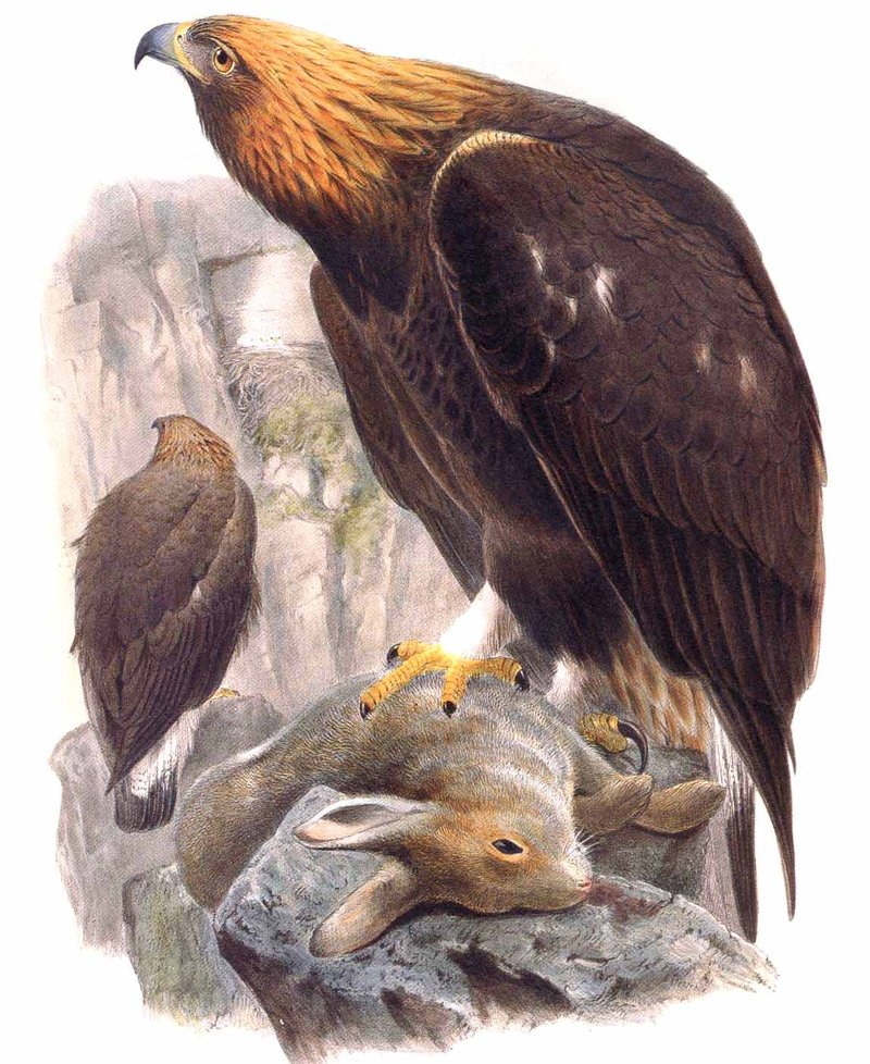 Golden Eagle